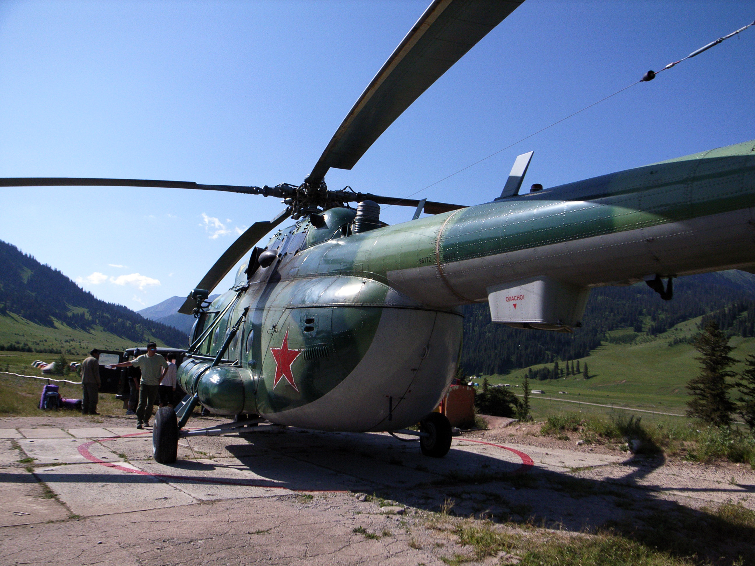 和 Mi-17 类似，应该是军用版，像 这个 或者这个。